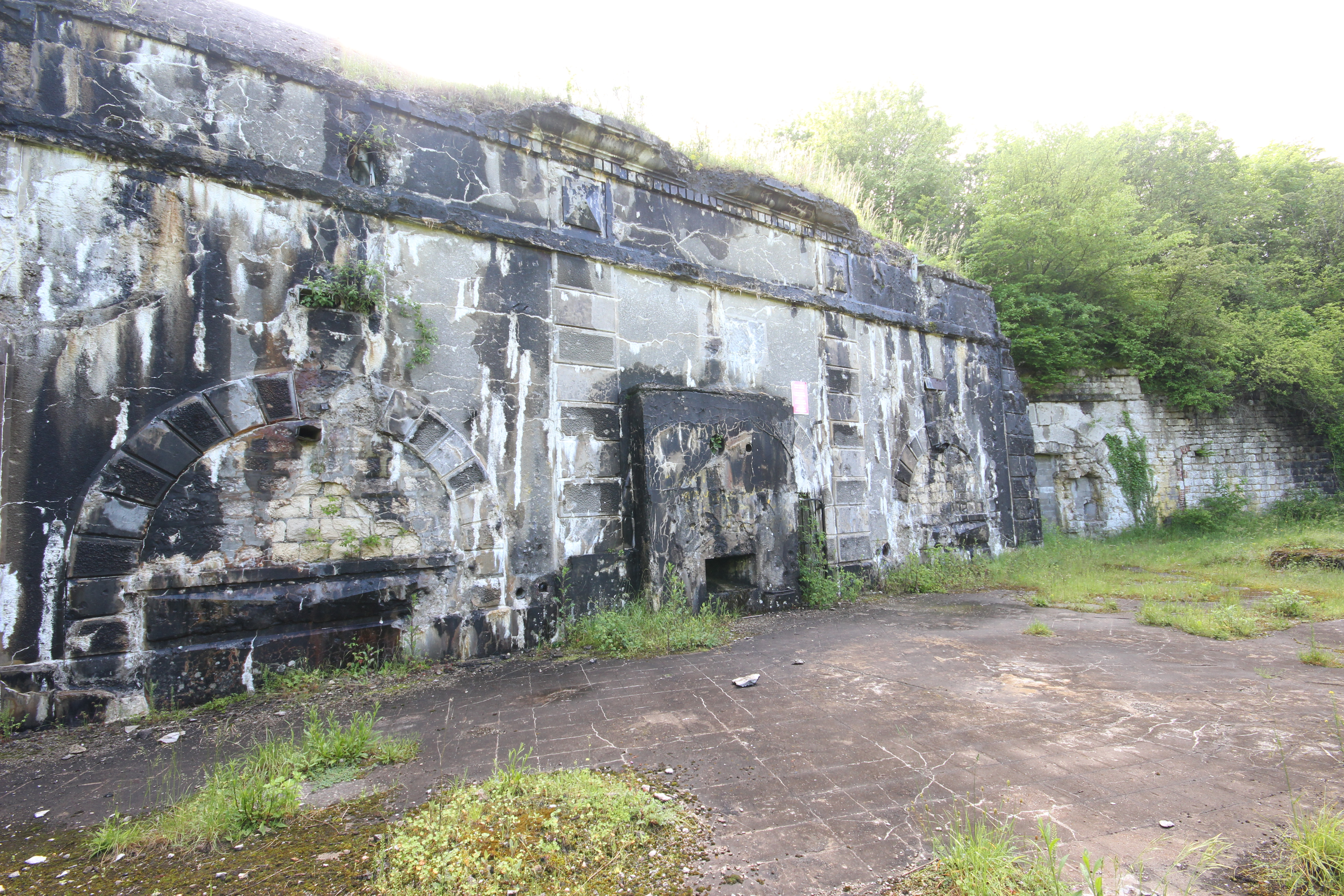 L'entrée du fort de Moulainville